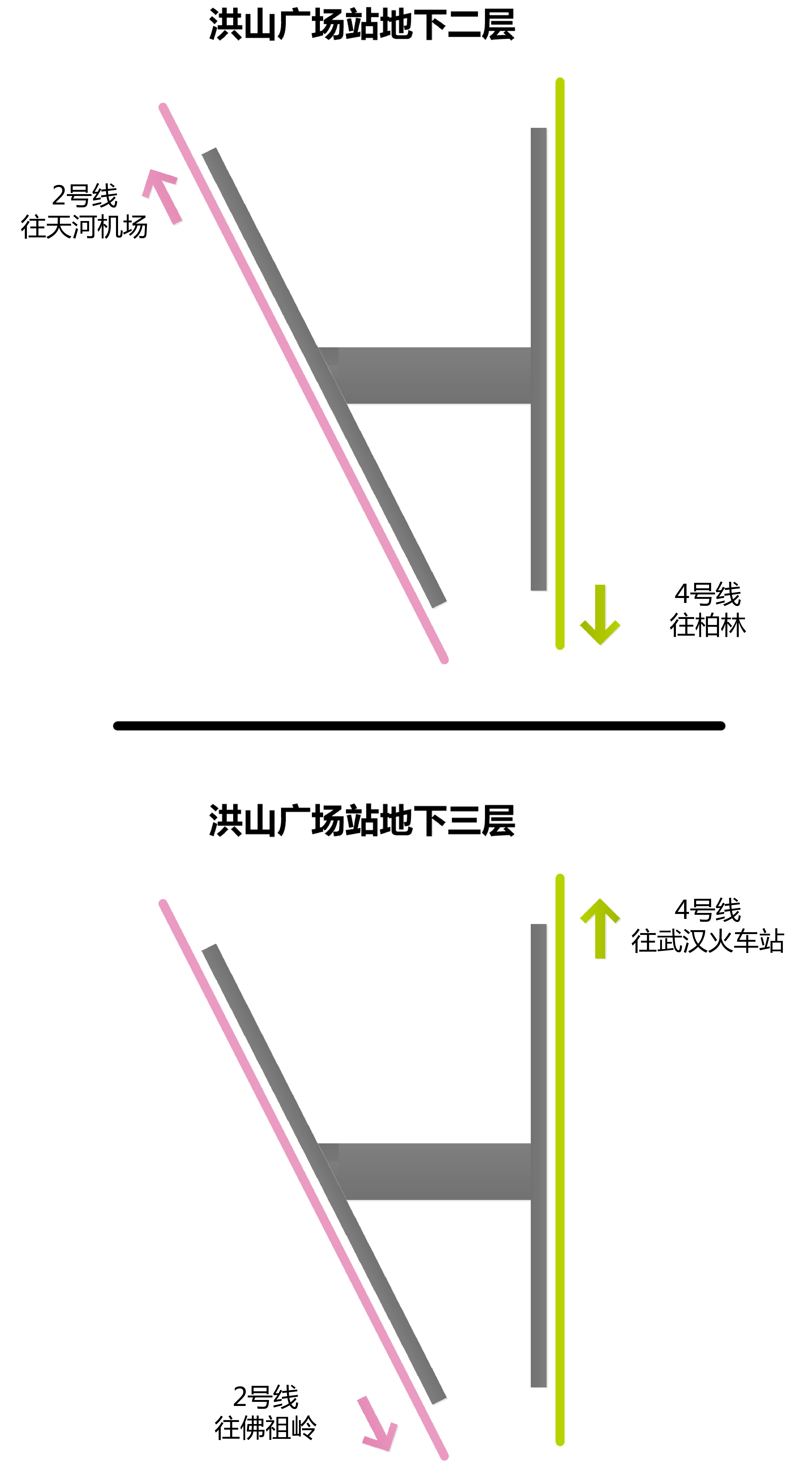 洪山广场站站线